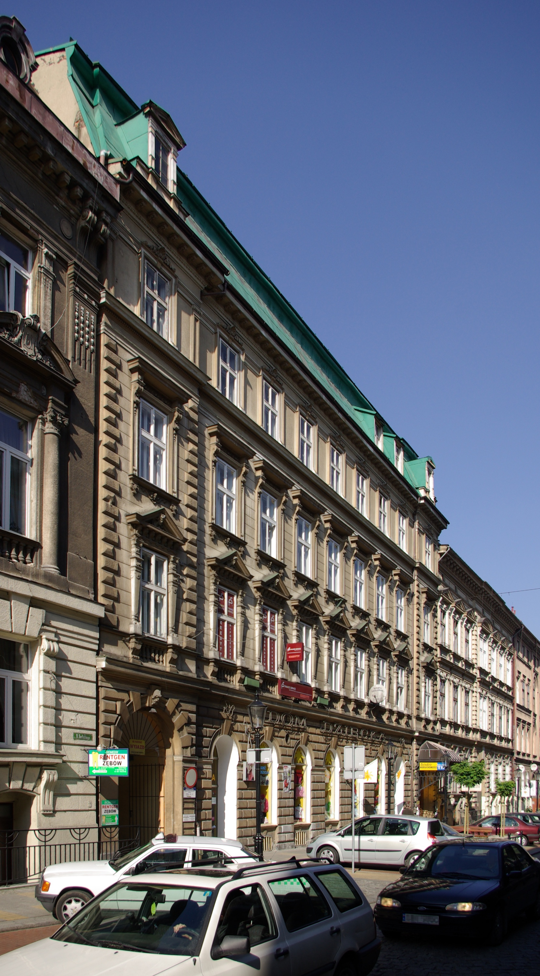 Bielsko-Biała, Ulica Norberta Barlickiego 15, Dawny Grand Hotel